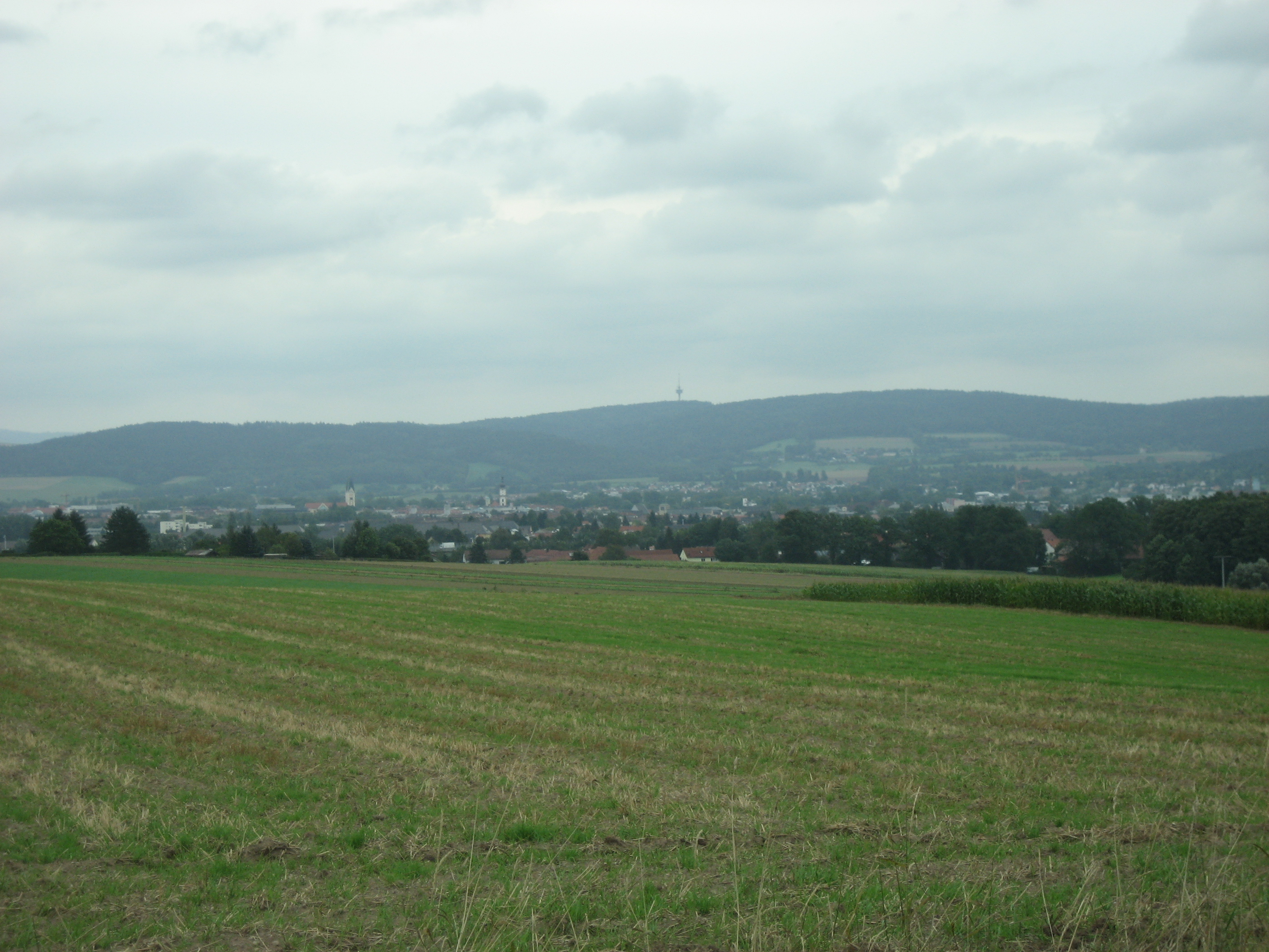 Blick auf das Weidener Becken und Fischerberg aus Westen.